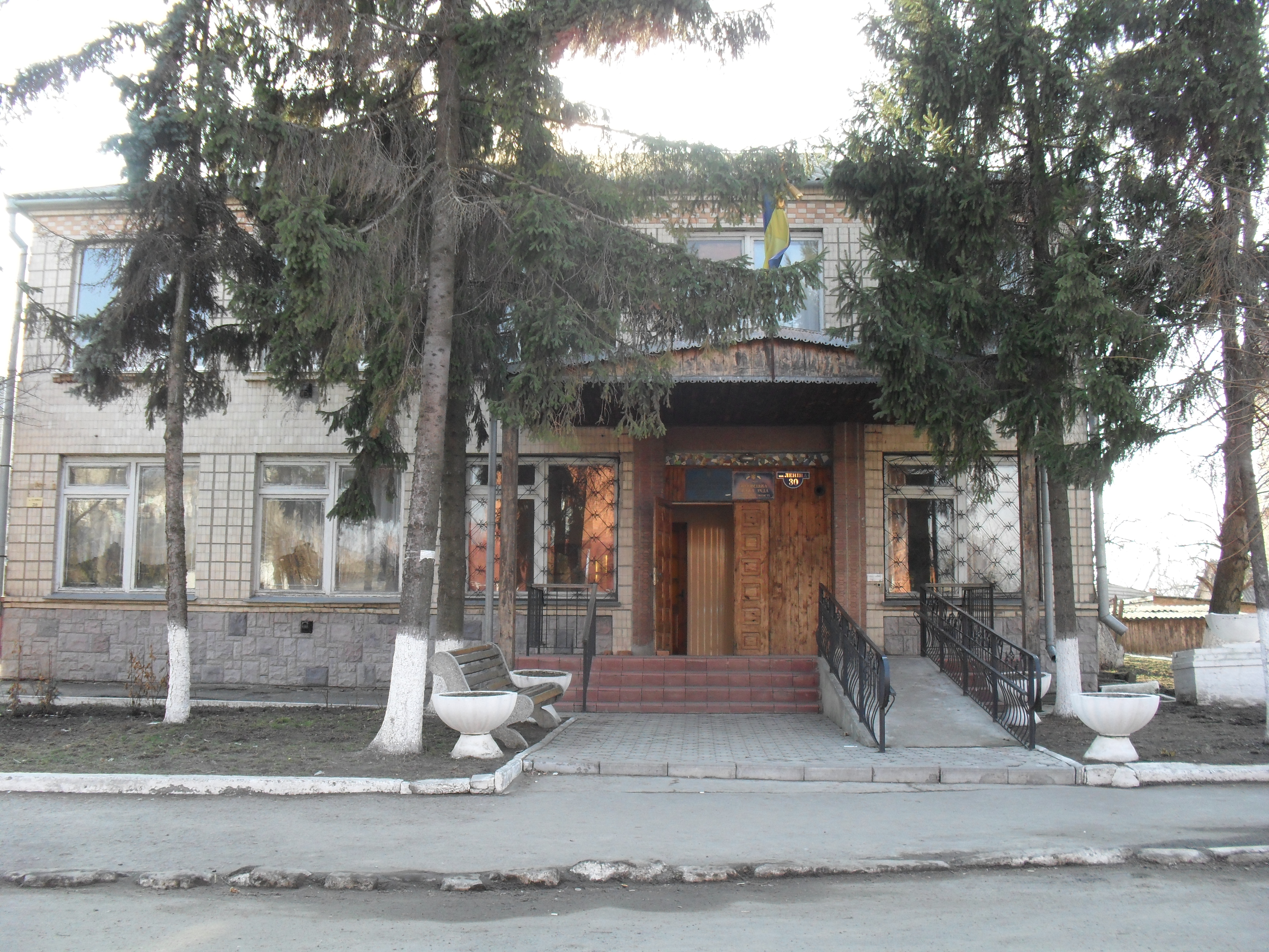 Липовецька міська рада